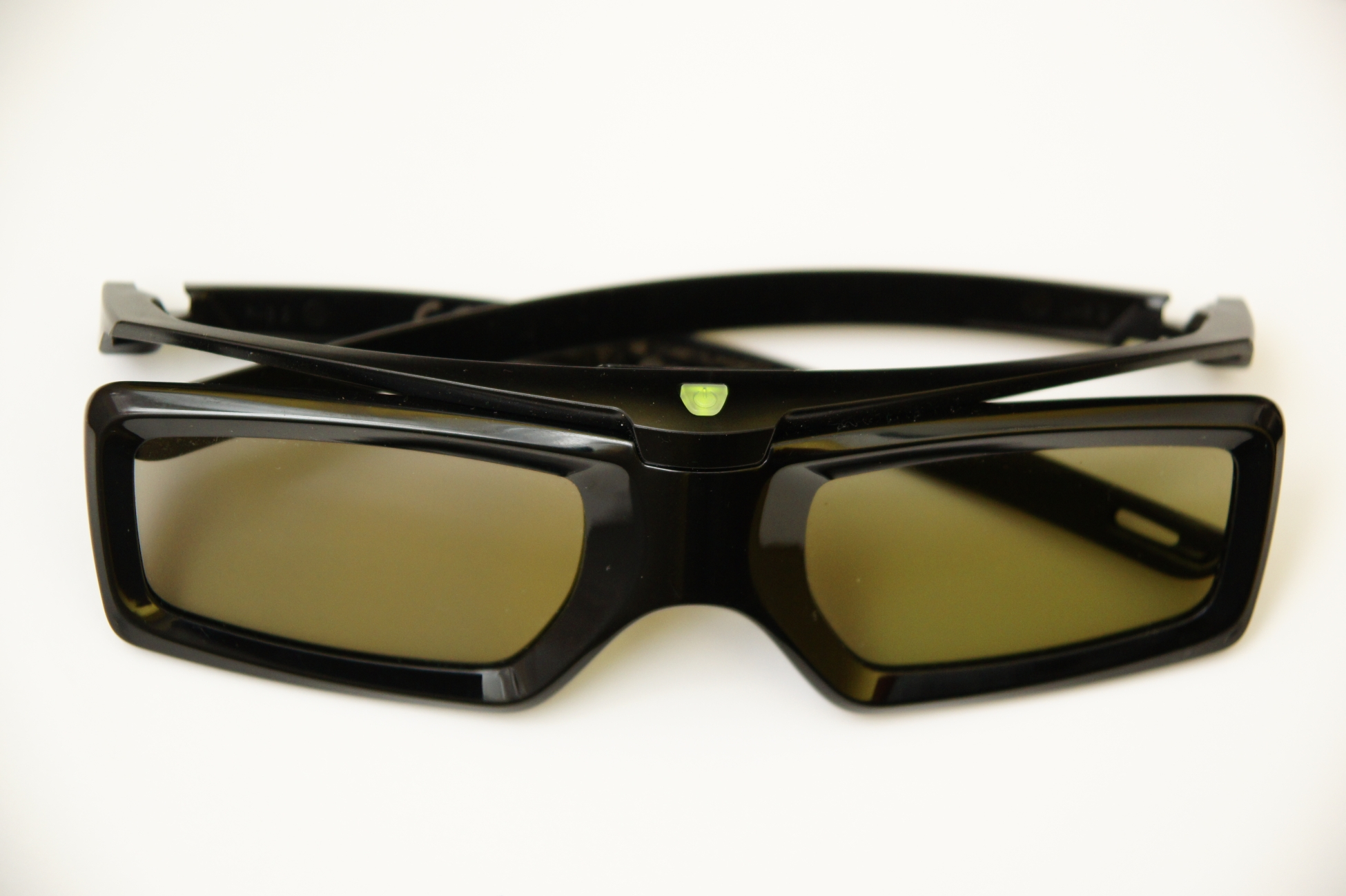 Okulary TDG-BT400A Zimny